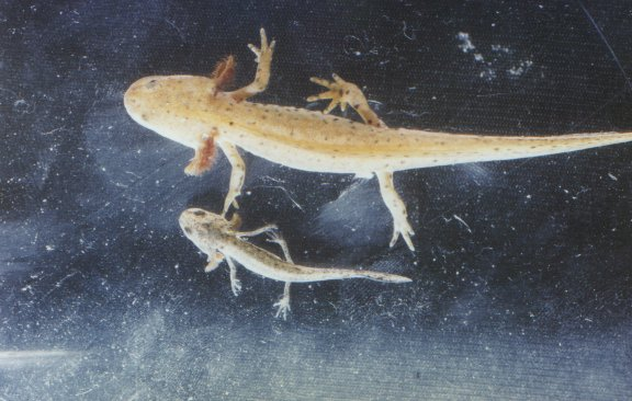 Ichthyosaura alpestris apuana, larva and neotenic adult, next to Murazzano (Italy)